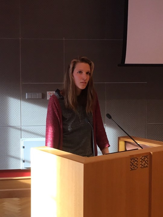 Koordinaator Väli säästva metsanduse konverentsil ettekannet pidamas.